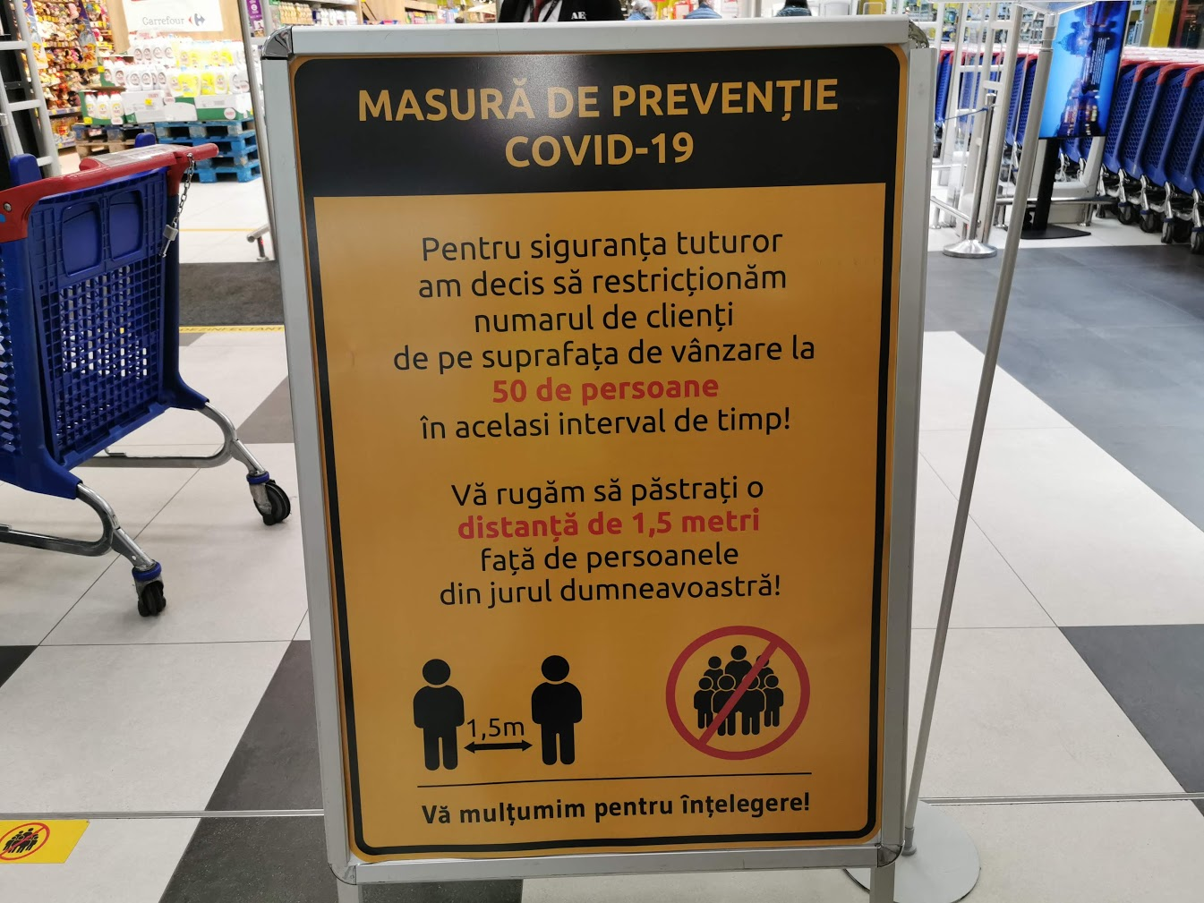 Măsuri de prevenție în supermarket, București, martie 2020.